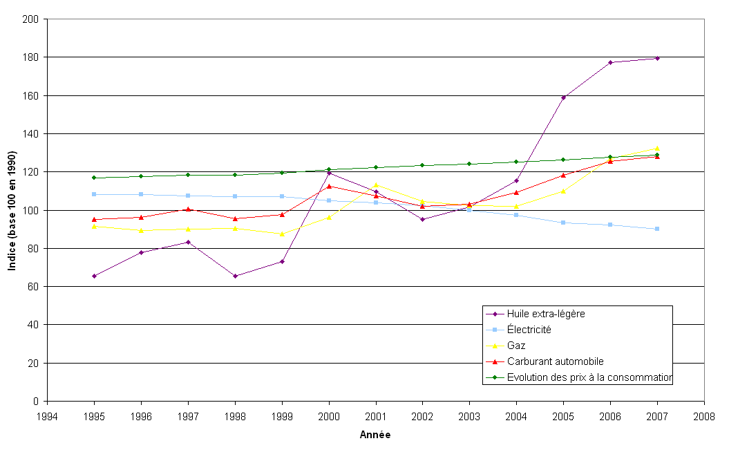 Evolution des prix de l'énergie en Suisse.